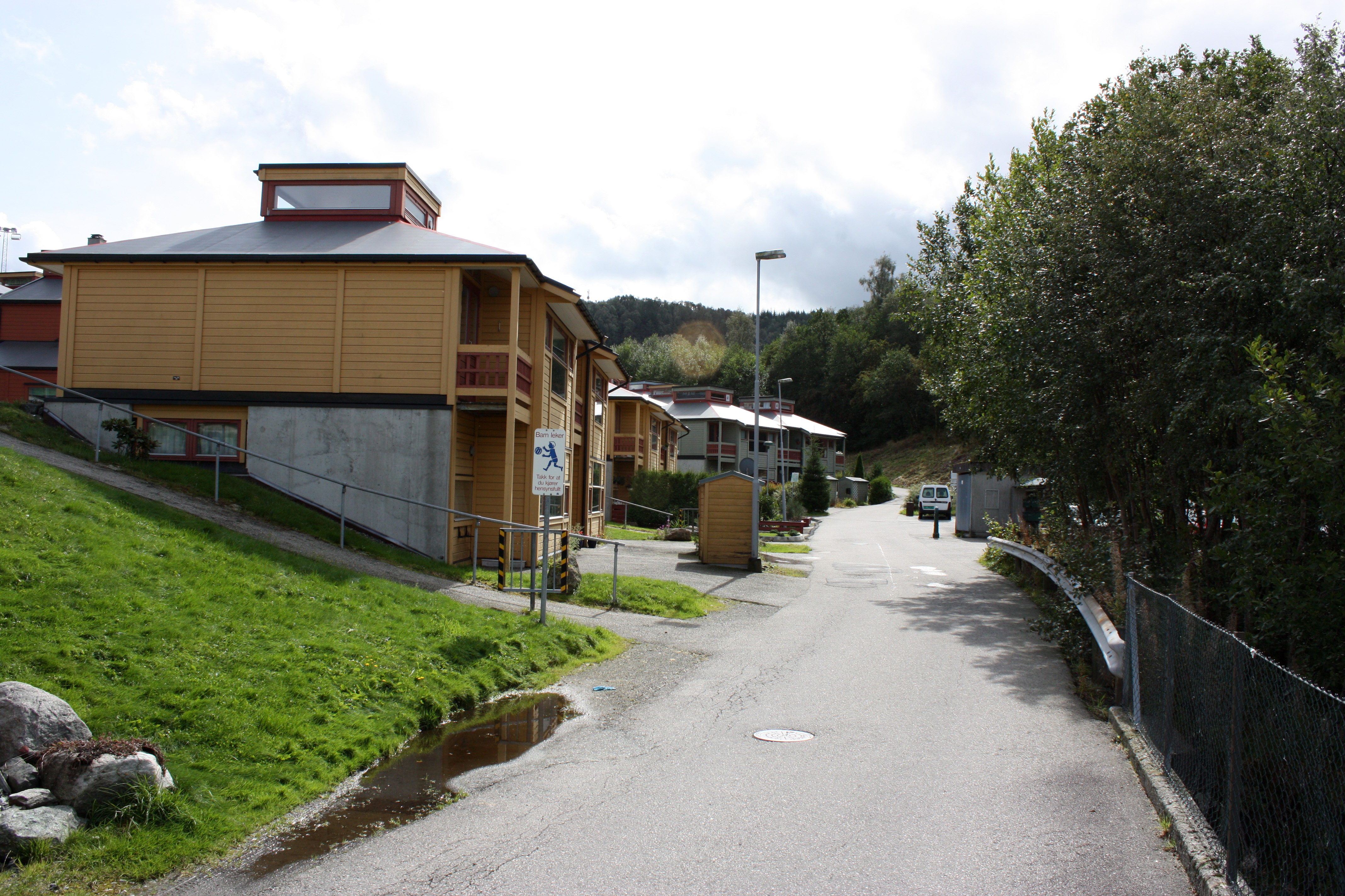 Slåtthauglia, Fana, Bergen. August 2009.